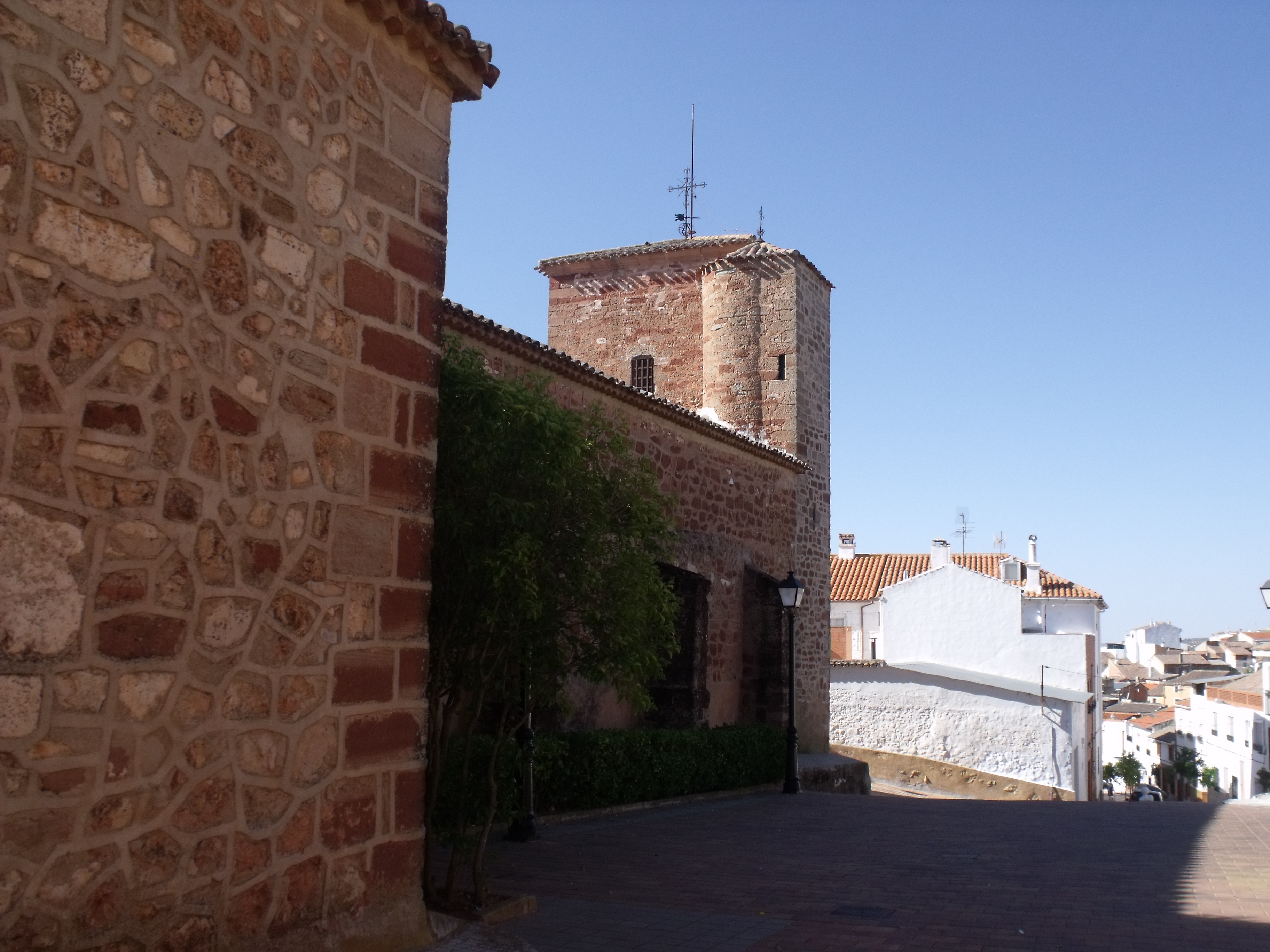 Albaladejo